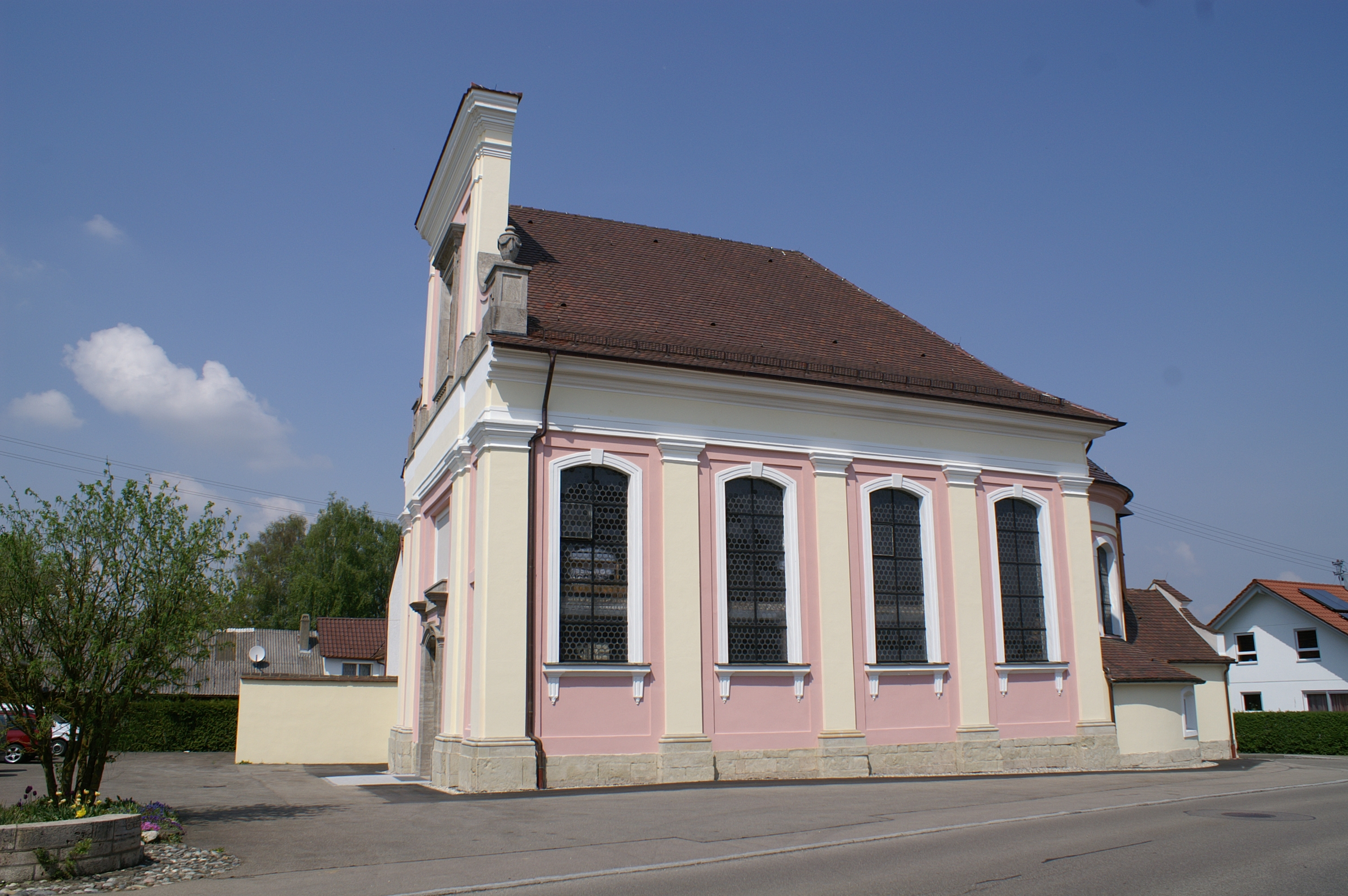 Dreifaltigkeitskapelle in Oberdischingen im Alb-Donau-Kreis.